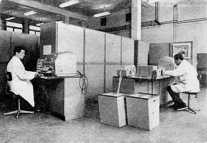 Doświadczalny komputer ZAM-3.